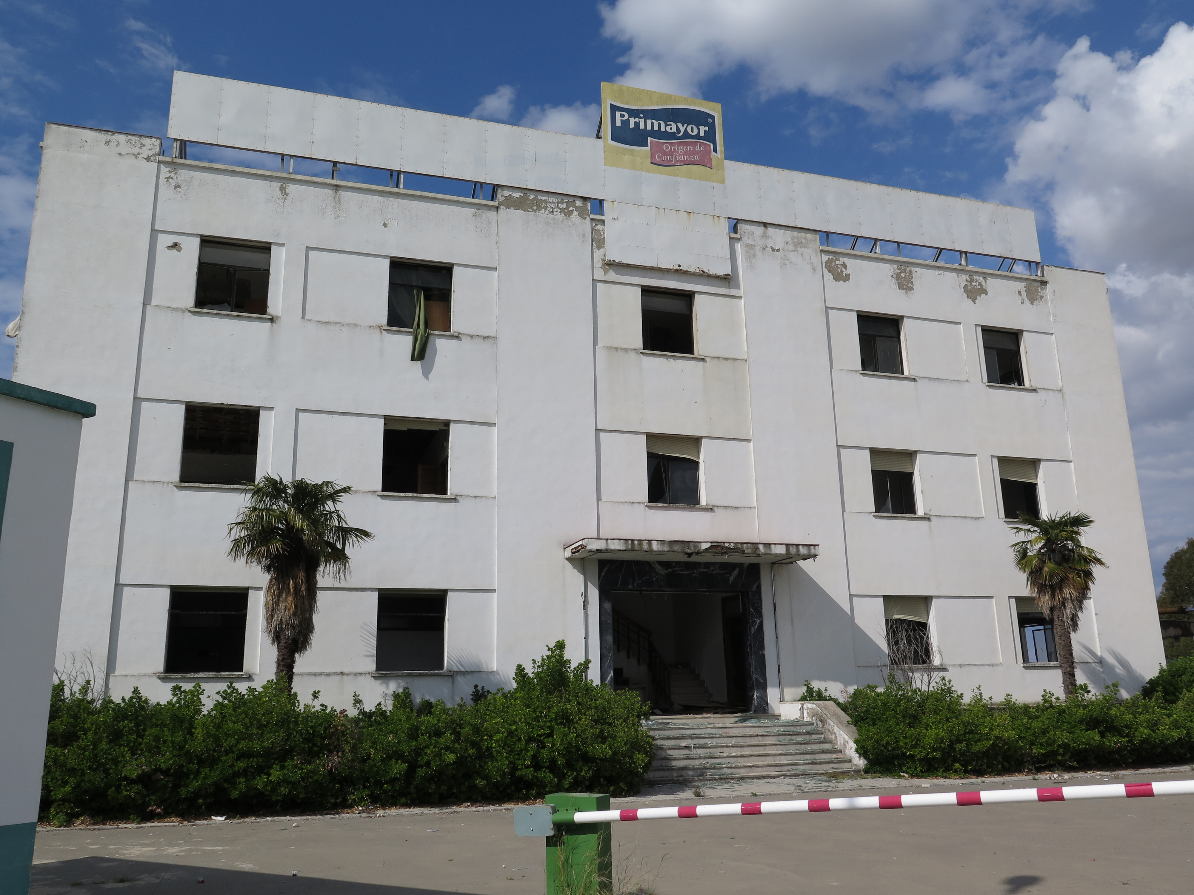 Vista del edificio de oficinas principal de la antigua Cárnicas Molina.